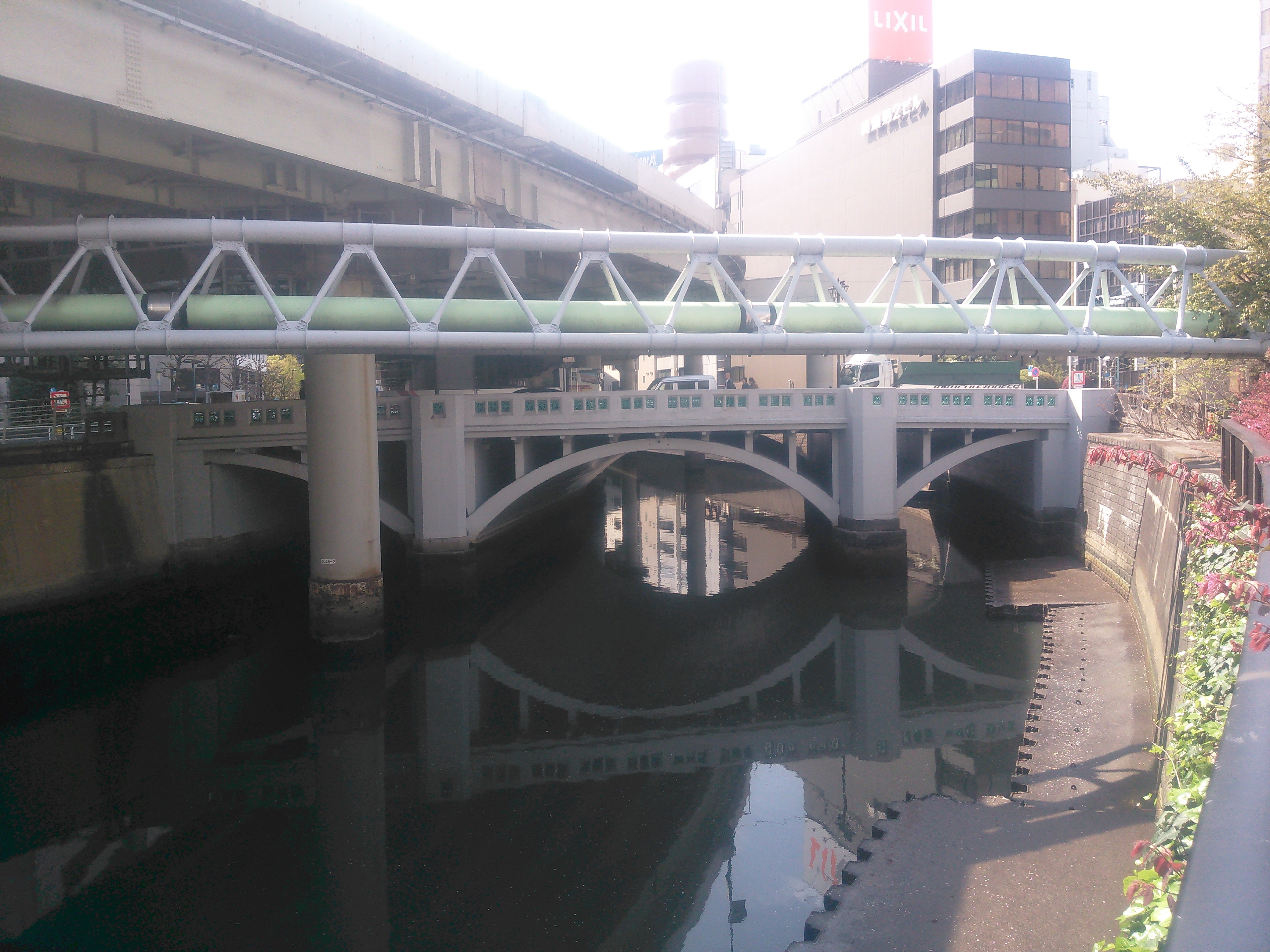 東京都千代田区、日本橋川に架かる錦橋